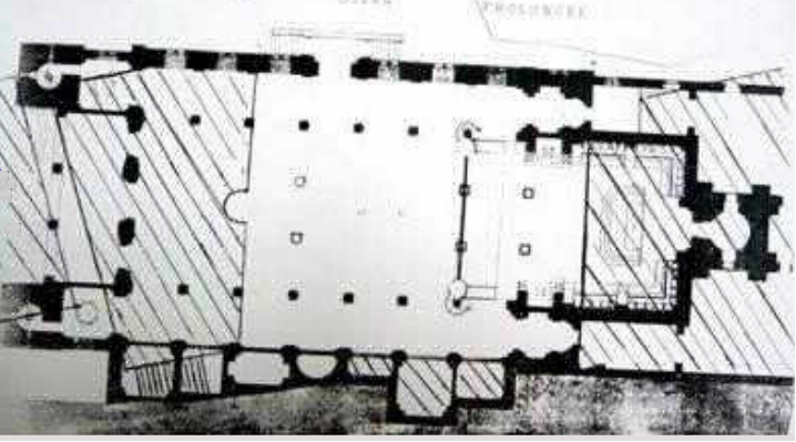 Plan de la Ketchaoua selon le projet de Ravoisier en 1842